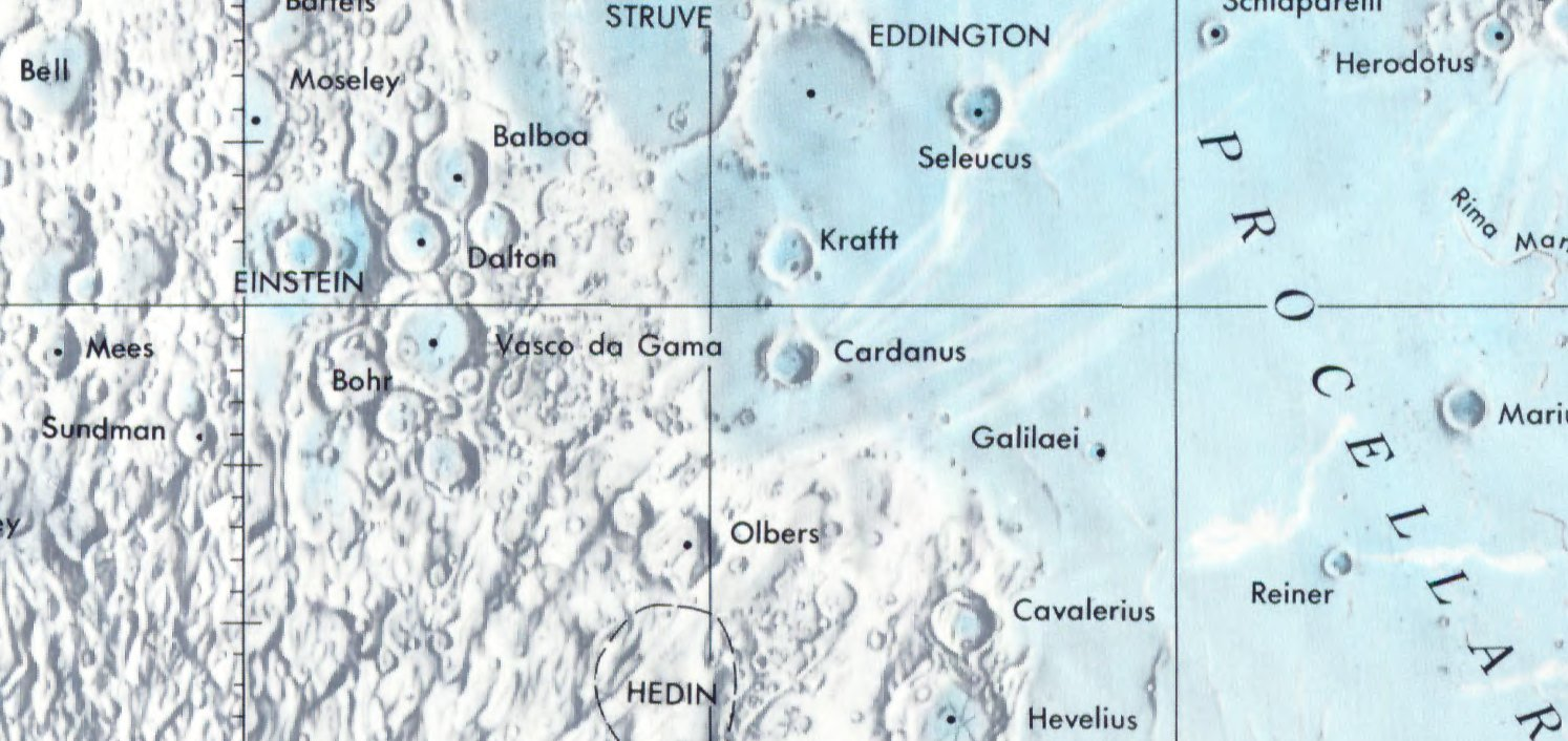 Cráter lunar Cardanus. Localización. (Lunar Chart LPC1. Second Edition)